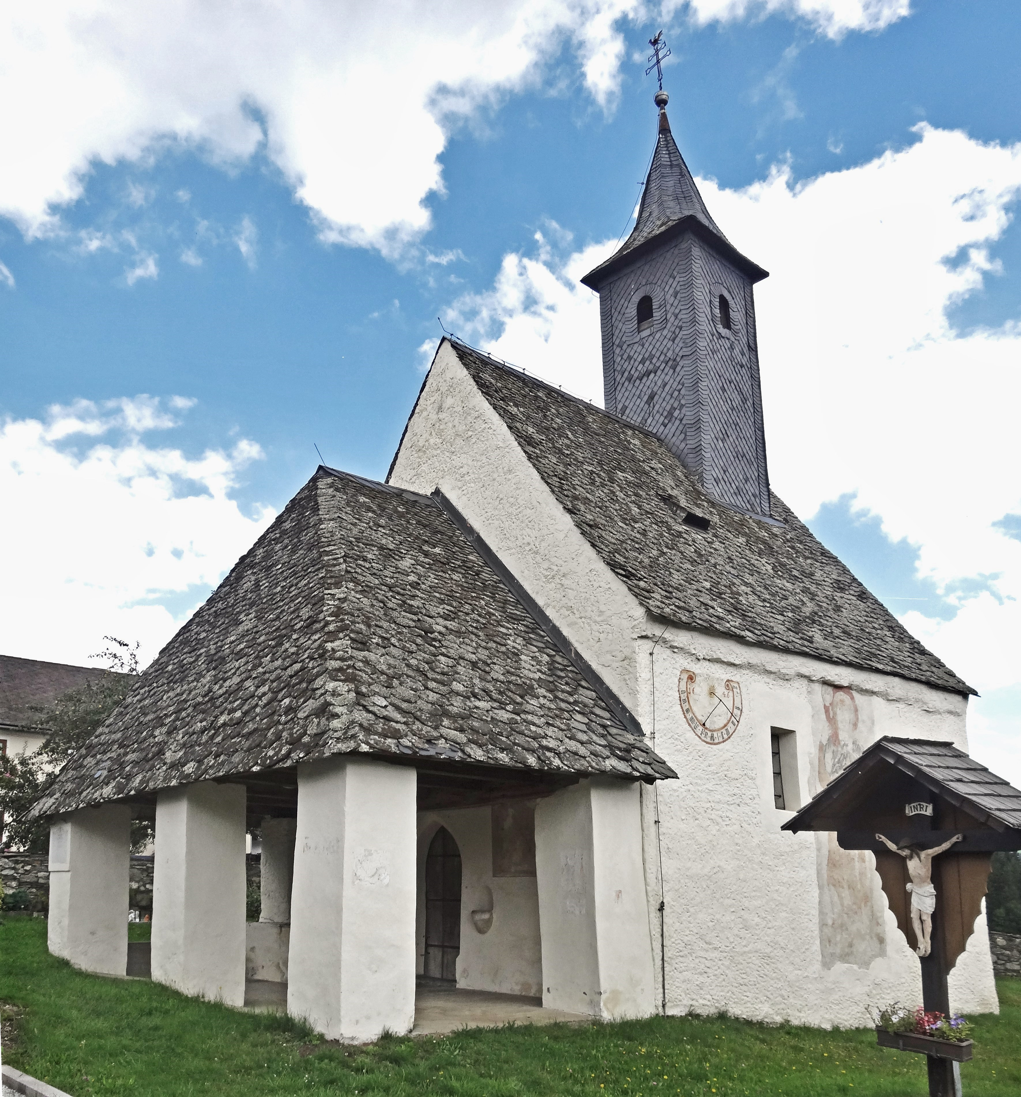 Kath. Filialkirche Hl. Lambert, Hart (Feldkirchen in Kärnten)